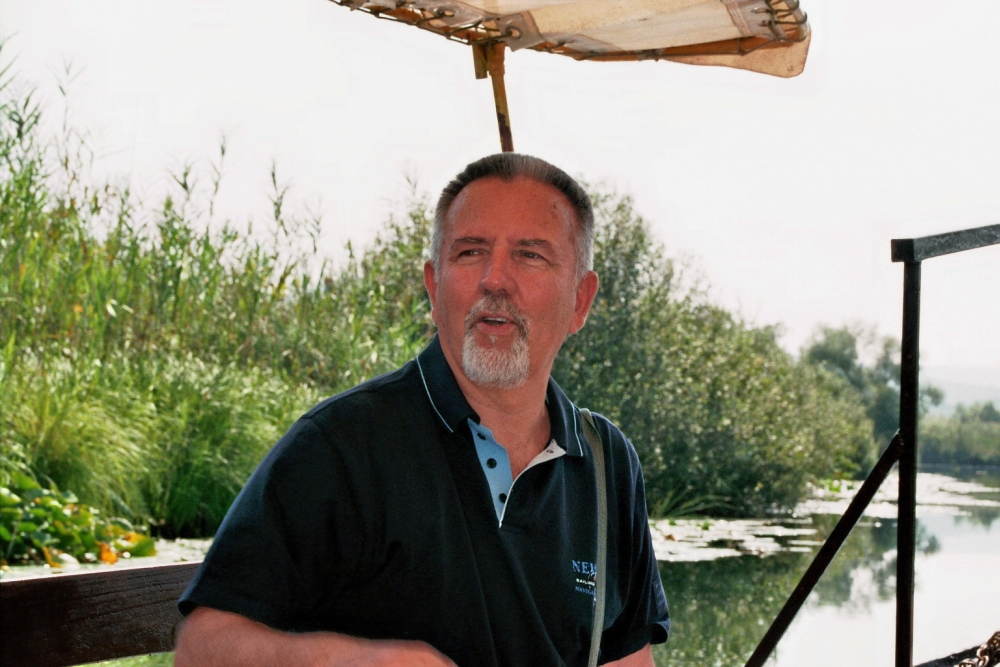 Hutovo Blato, 2010